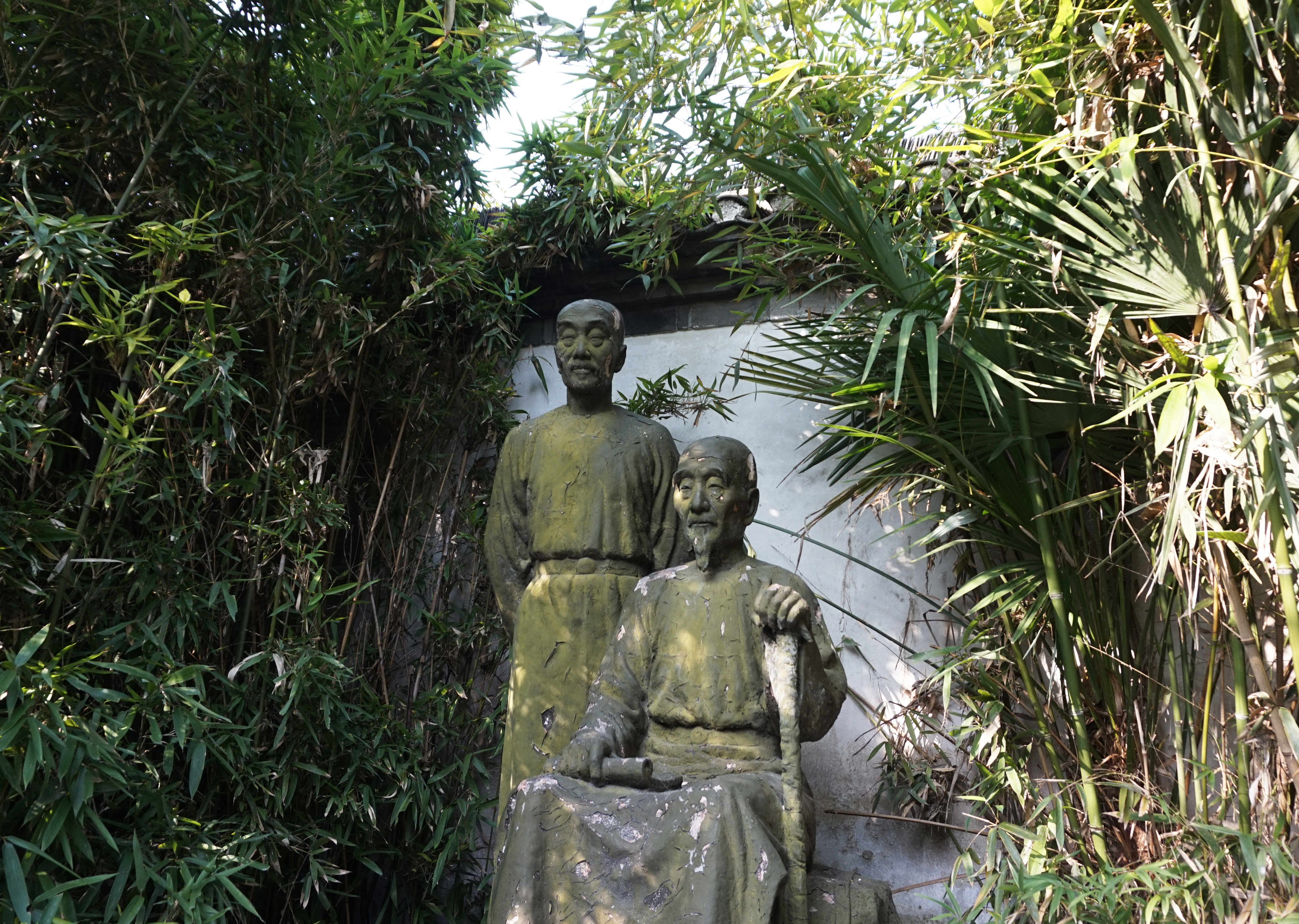 高邮王氏父子像。